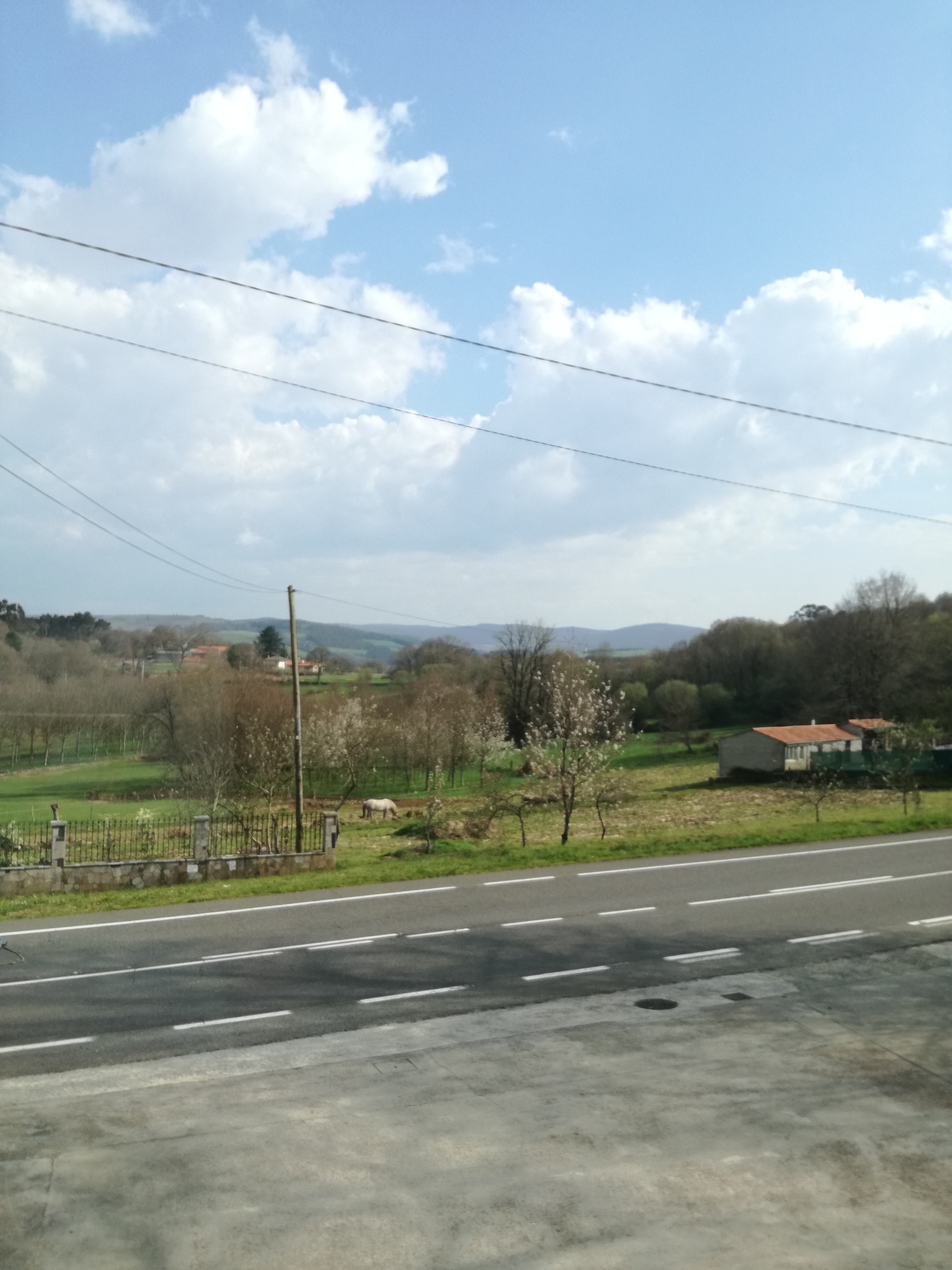 Vista de Vistalegre